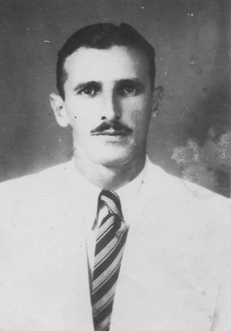 Português do Brasil: Retrato Paschoal